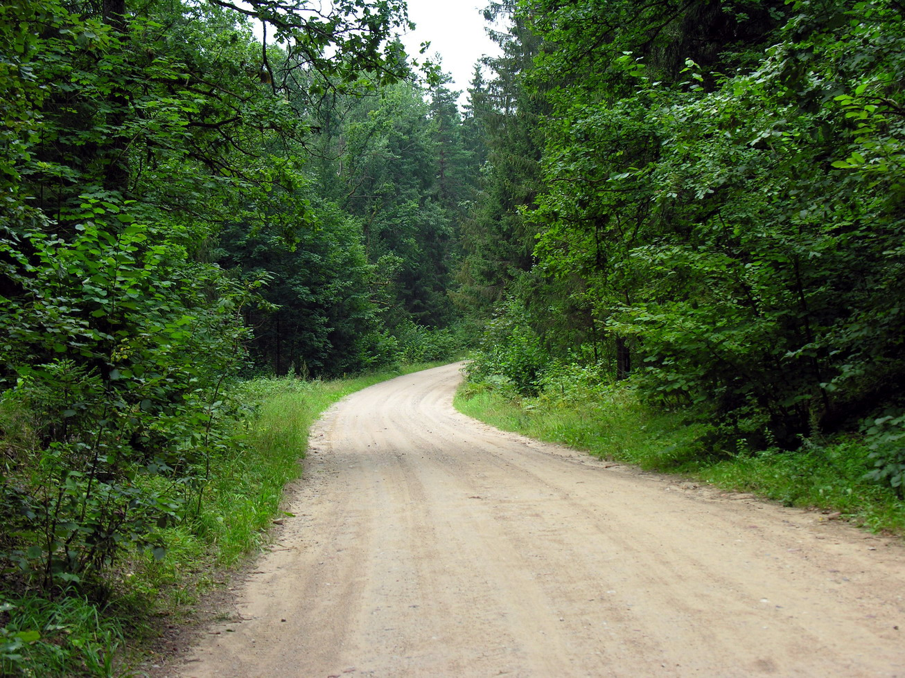 Žemaitėška: bat-smg:Stėrbaitē (lt. Stirbaičiai), kels pro Stėrbaitiu eigova bat-smg:Žemaitėjės naciuonalėnis parks Puortegrapėje Algirda, 2007-08-23, bat-smg:Žemaitėjė